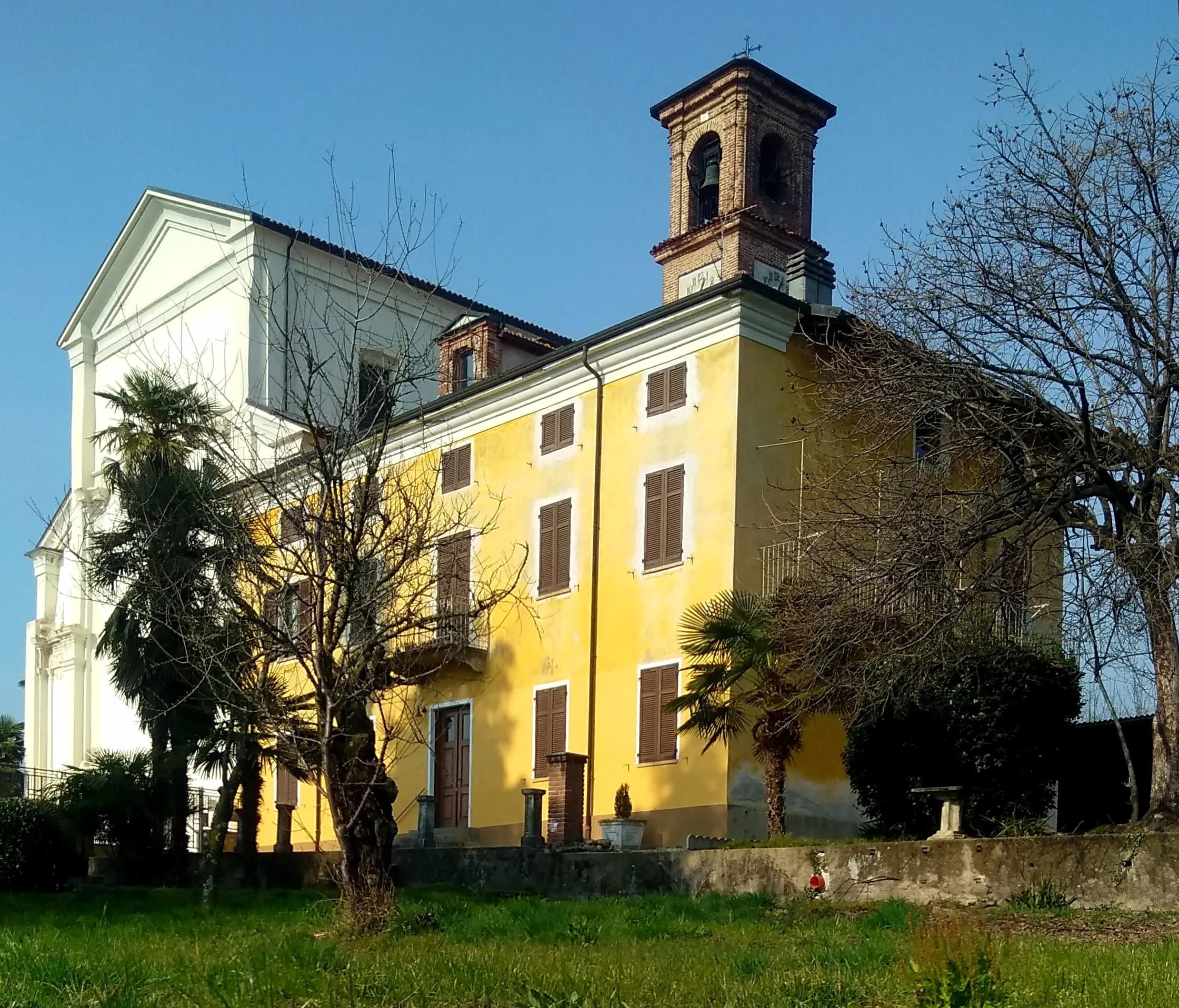 Piatto (BI) chiesa parrocchiale